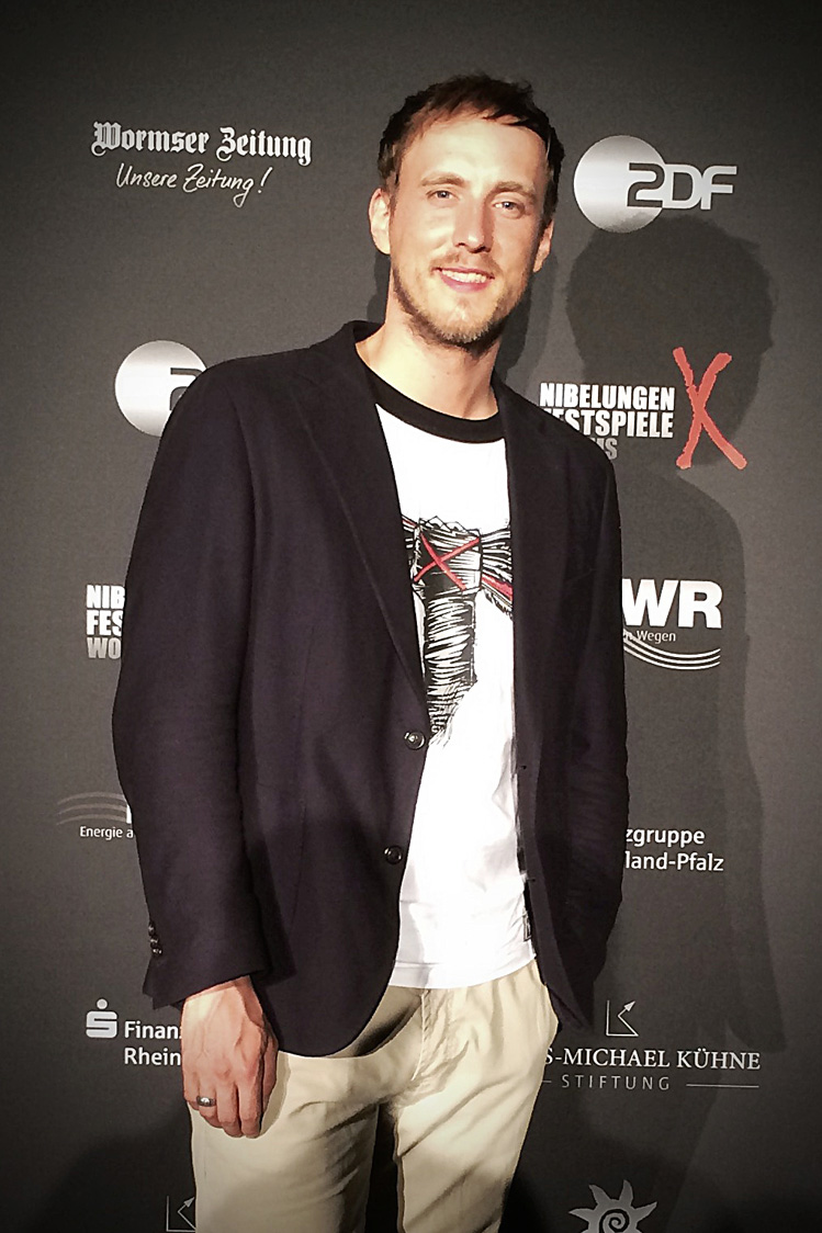 Sebastian Achilles - Nibelungen Festival 2014